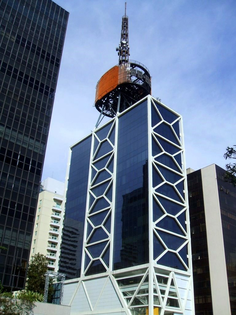 Instituto Itaú Cultural, na Avenida Paulista, São Paulo, Brasil